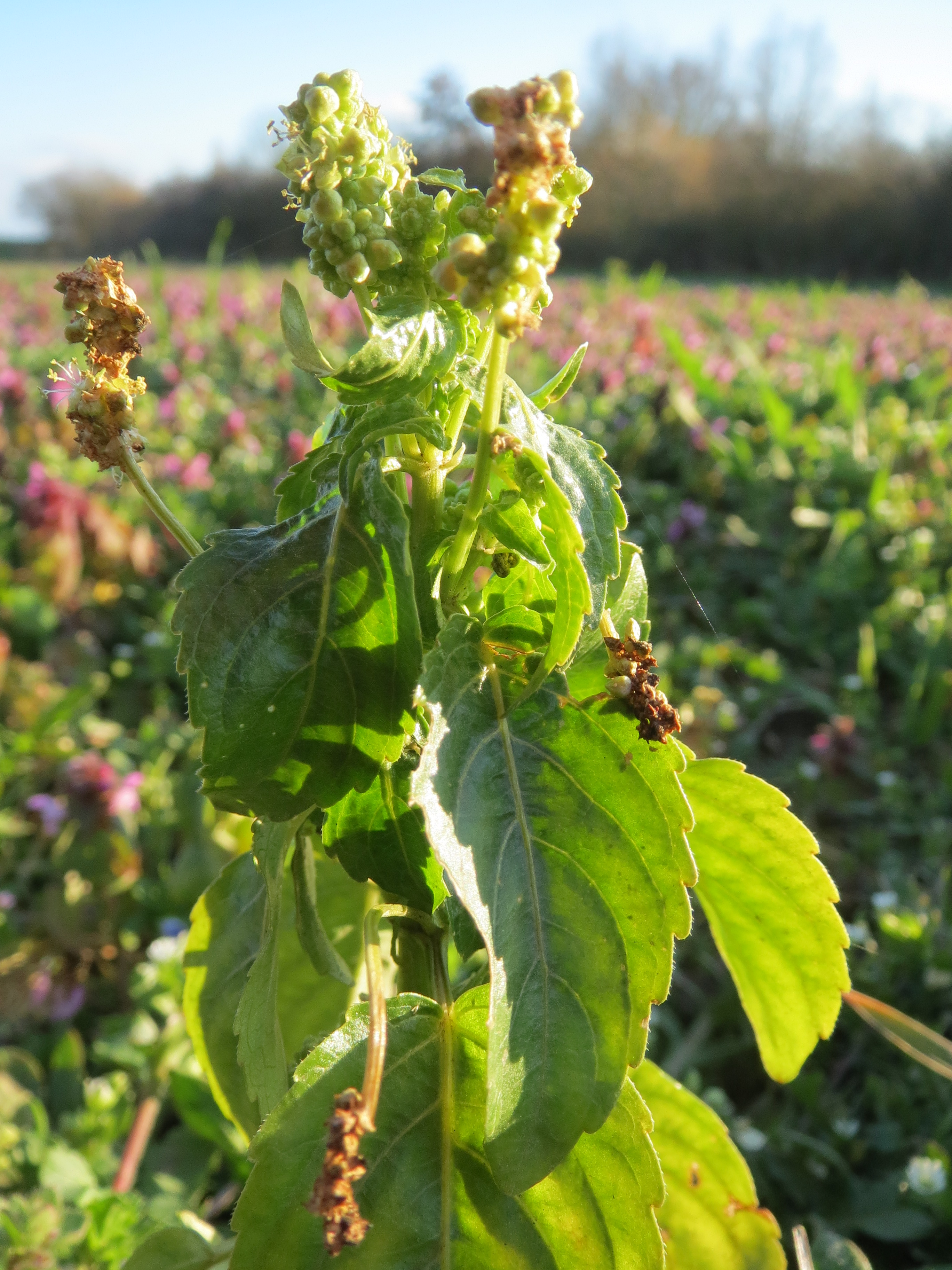 Einjähriges Bingelkraut (Mercurialis annua) im Hockenheimer Rheinbogen